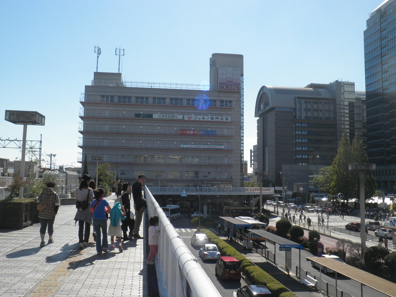 ジョルノ専門店街